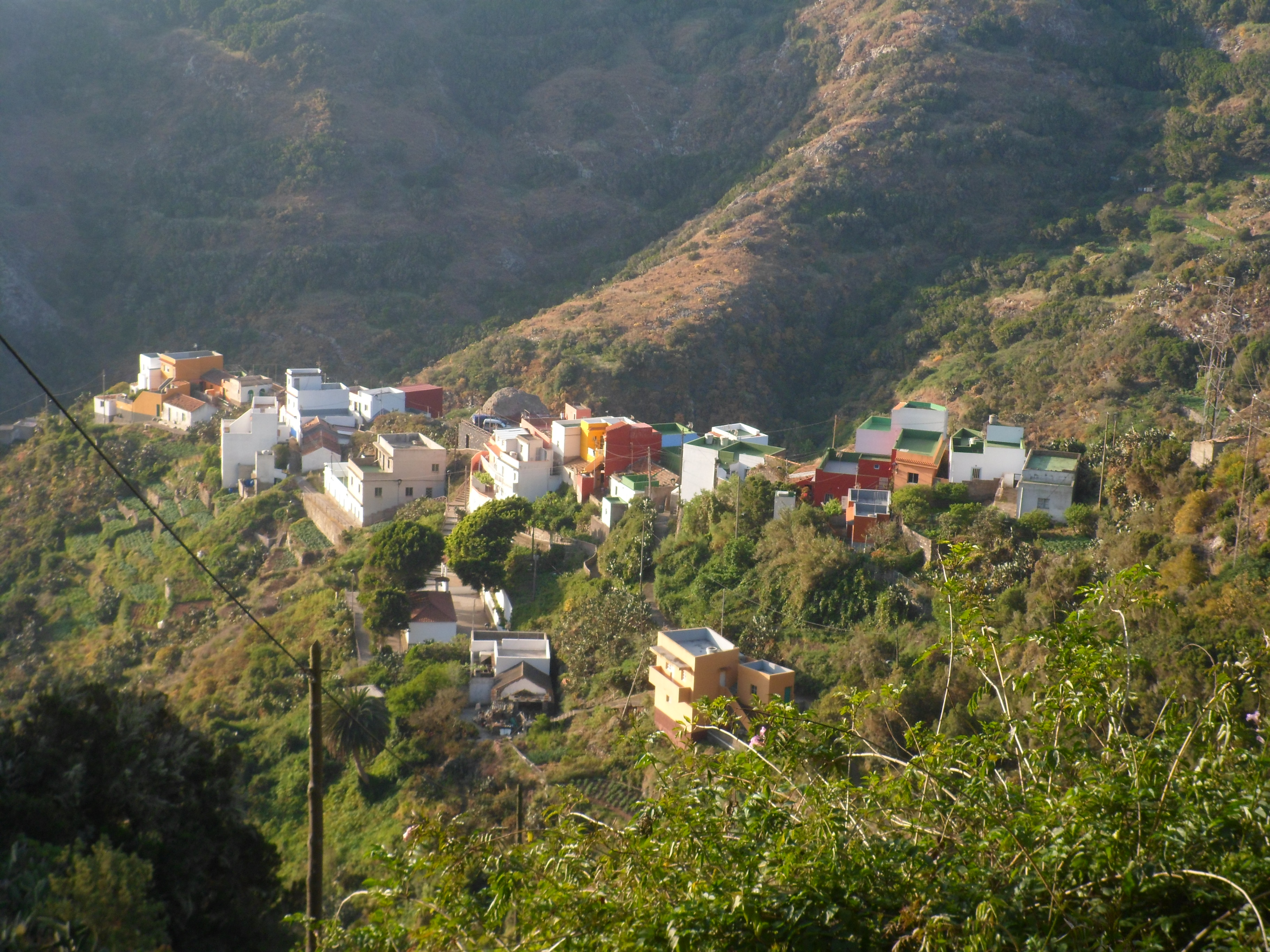 Caserío de Lomo de Las Bodegas, Anaga (Tenerife)